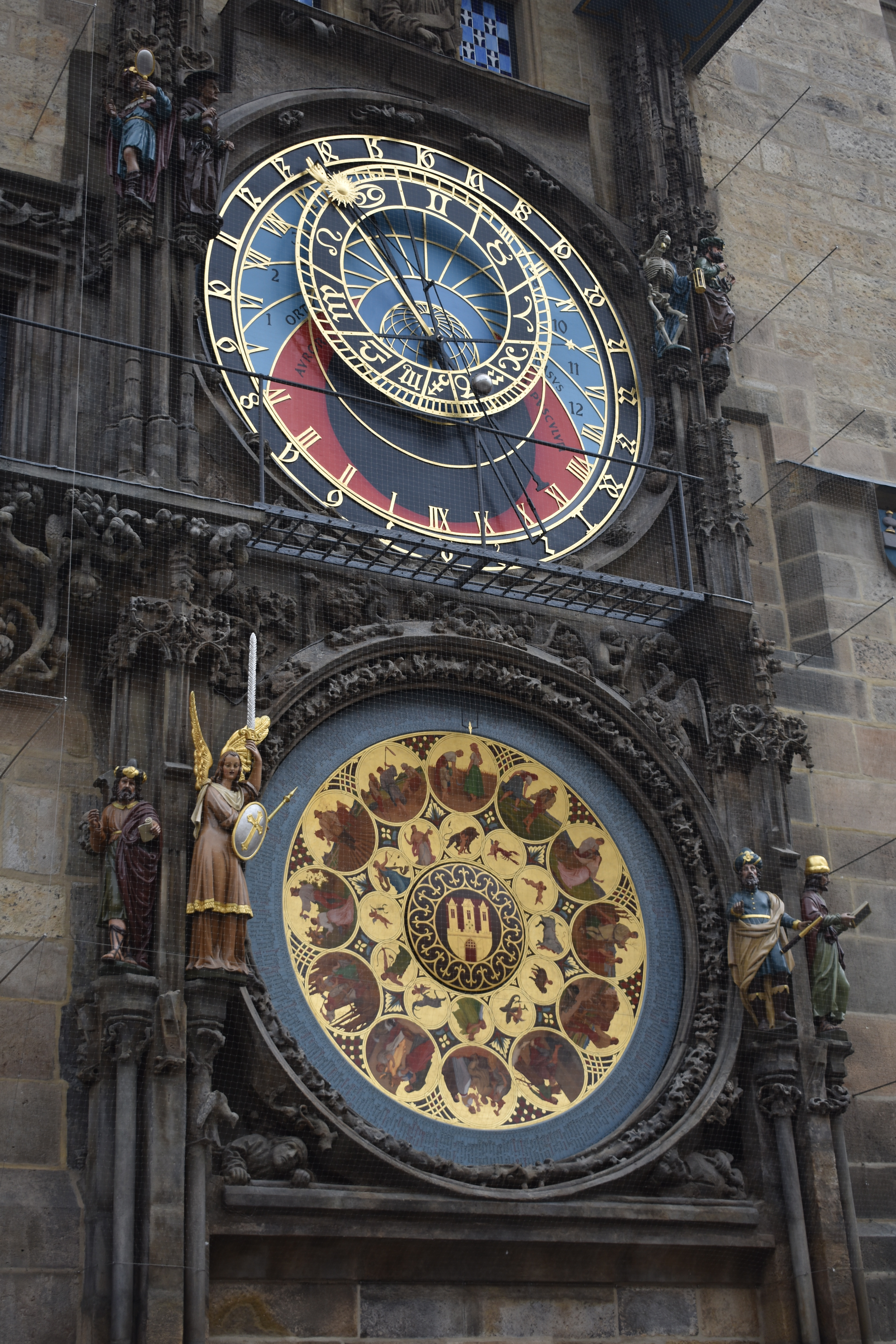 L'orologio astronomico di Praga restaurato nel 2018.